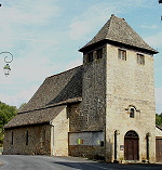 Eglise romane avec un clocher en forme d'ancien campanile